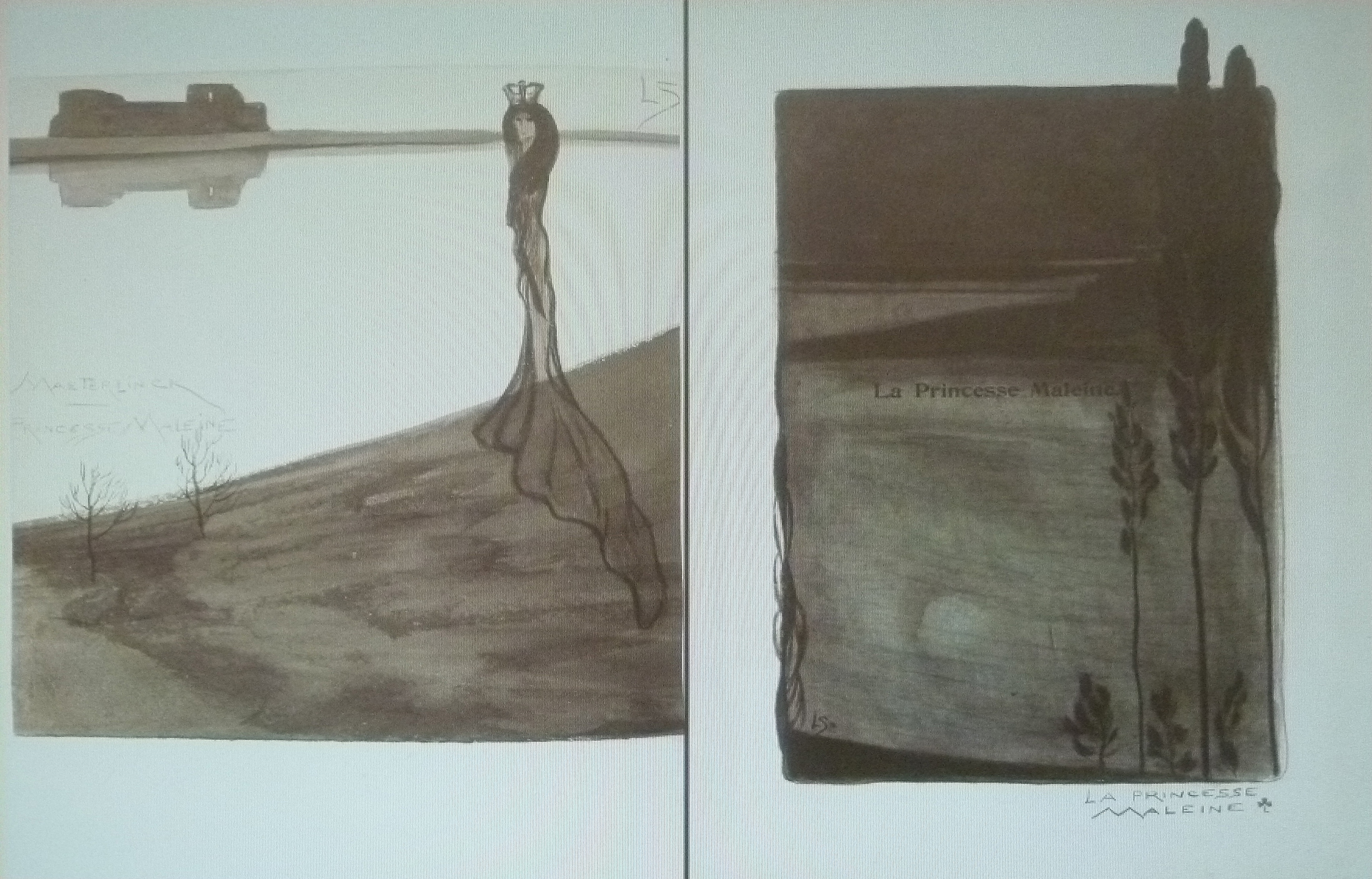 "La Princesse Maleine" (1889), pièce de théâtre par Maurice Maeterlinck; illustrations par Léon Spilliaert (1903); collection privée